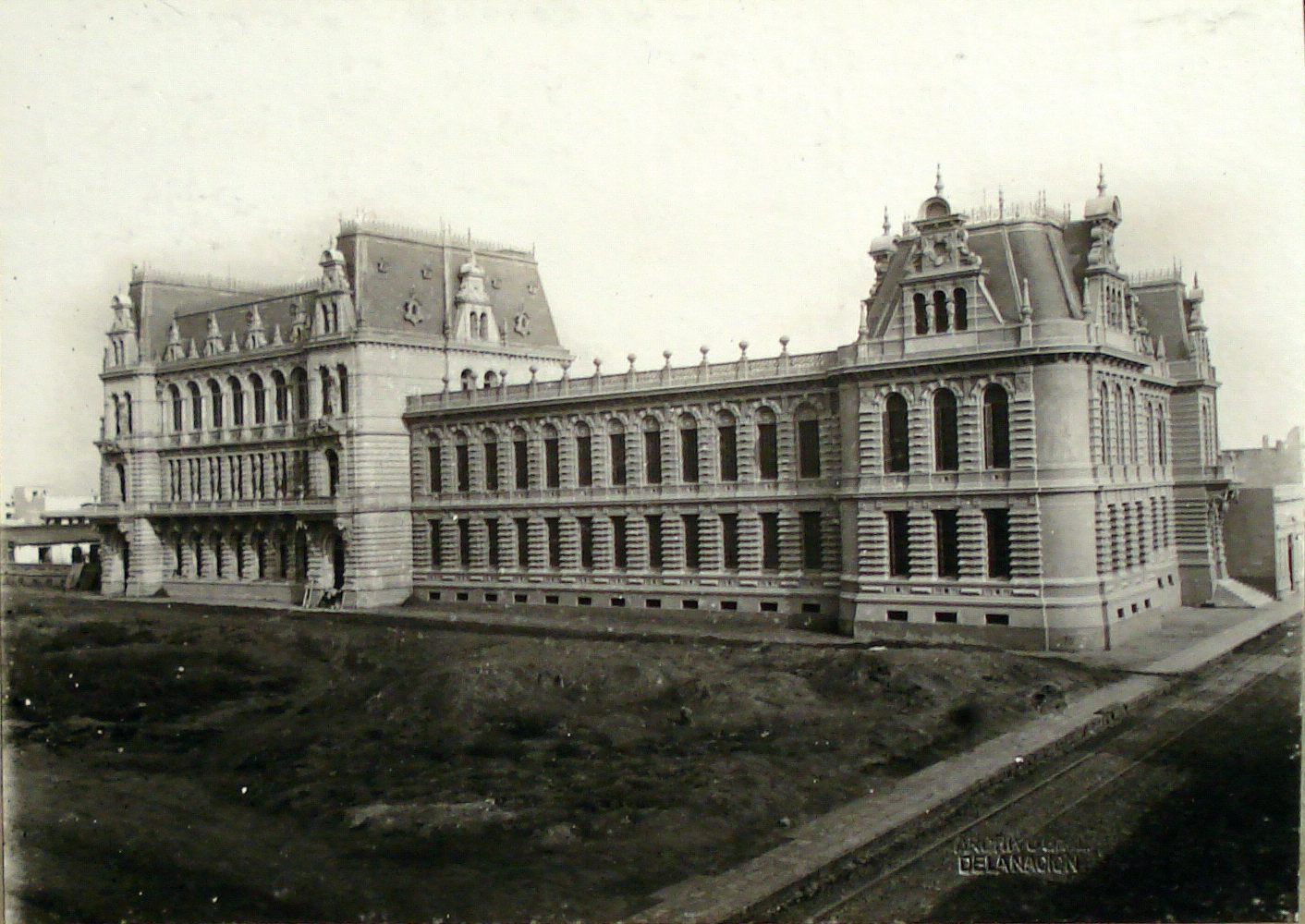 Palacio Pizzurno, sede del Ministerio de Educación, en construcción hacia 1890. Buenos Aires, Argentina.